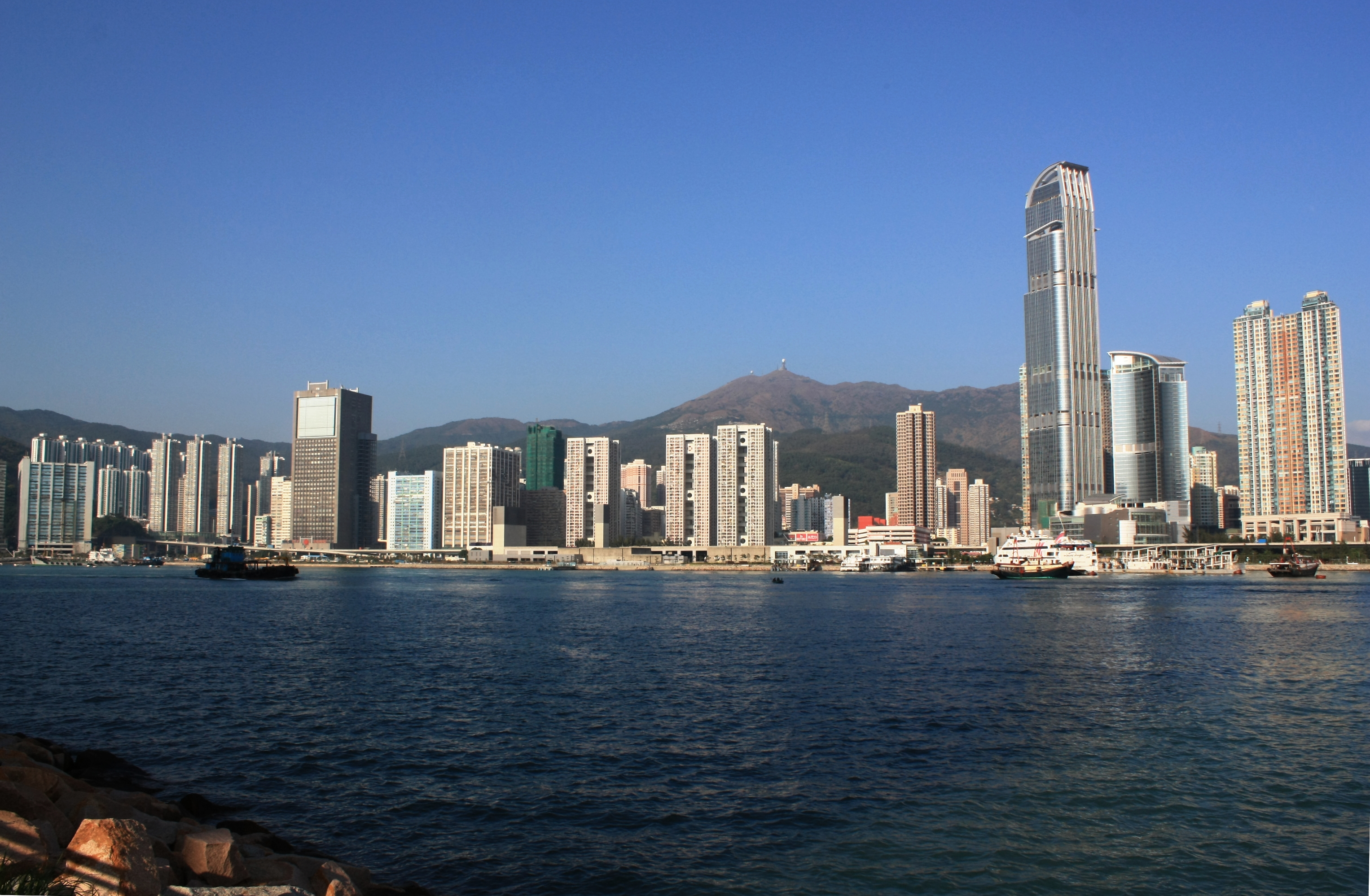 Tsuen Wan Skyline 荃灣